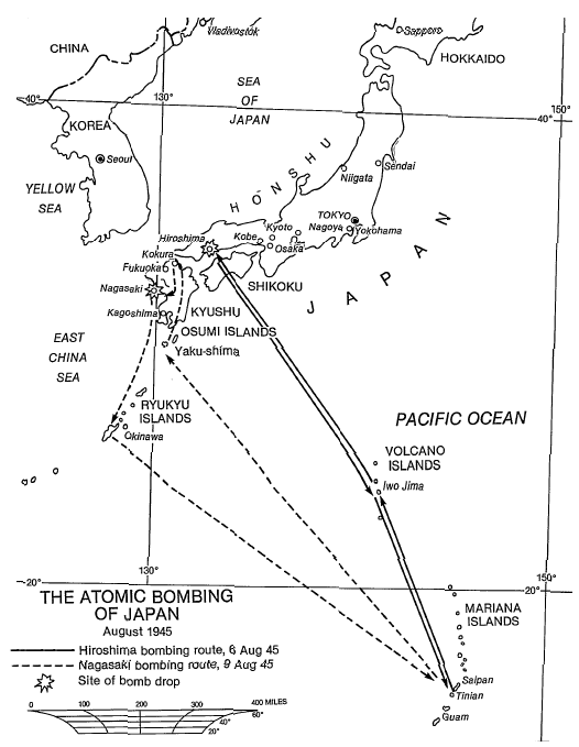 Plánovaný let z Tinianu k Japonsku, konkrétně k Hirošimě a Nagasaki. Plánovaný sraz letadel v Iwodžimě.